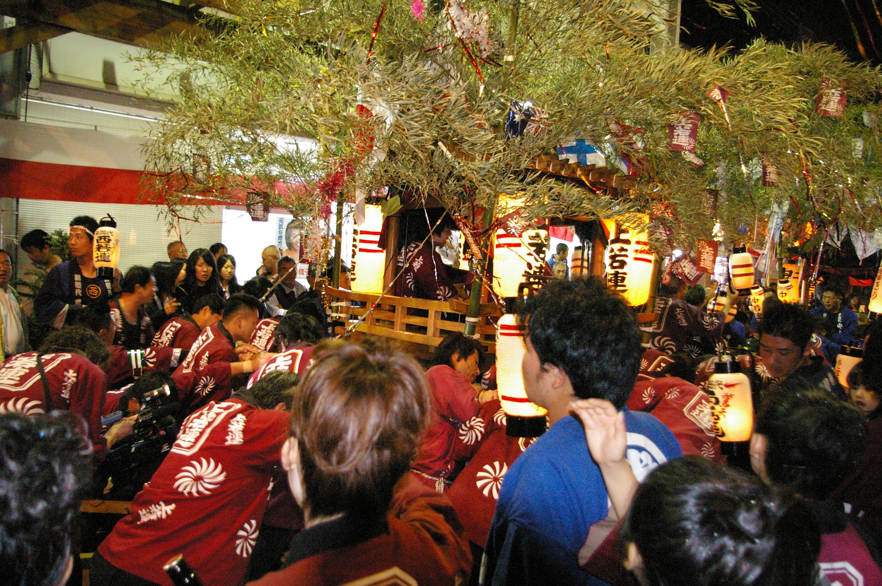 岡山県真庭市勝山で開催される喧嘩だんじり